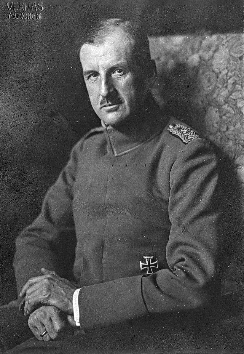 Major Otto Hermann von Lossow